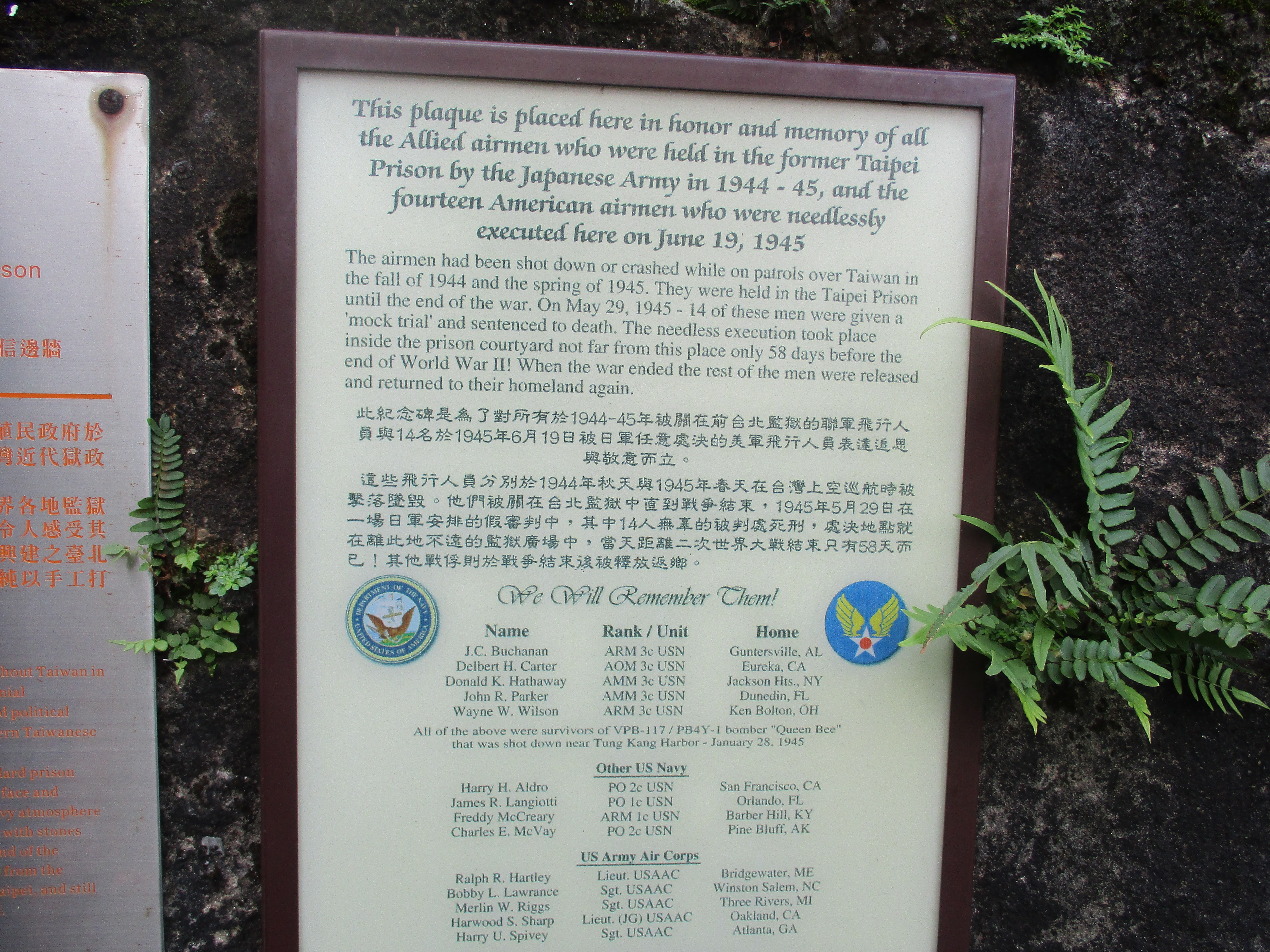 타이베이 형무소 벽 유적에 미국 정부가 세운 미군 희생자를 기리는 명판中文（台灣）: 臺北監獄圍牆遺蹟被俘美軍飛行人員紀念牌。